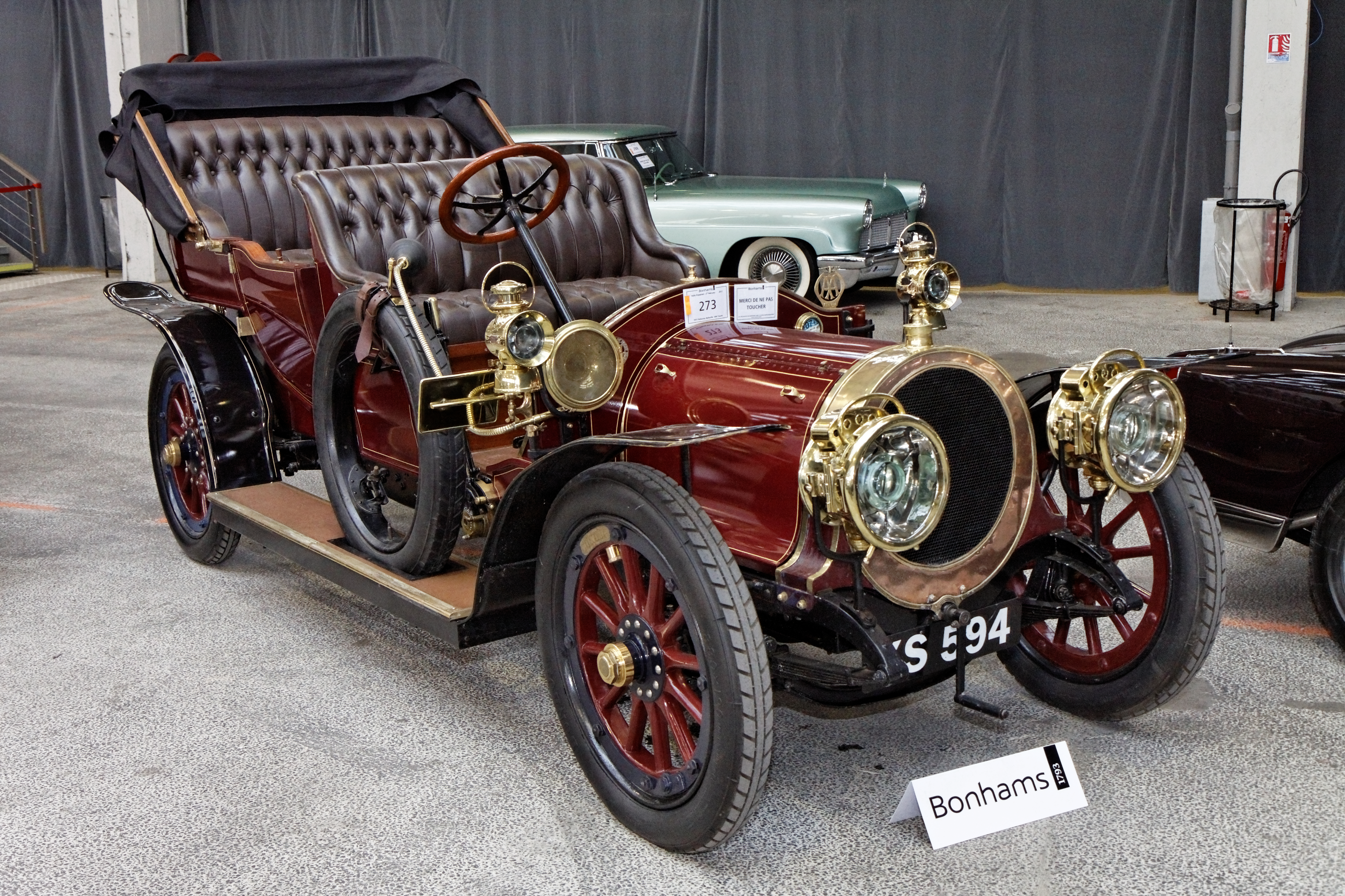 Delaunay-Belleville HB4 Tourer